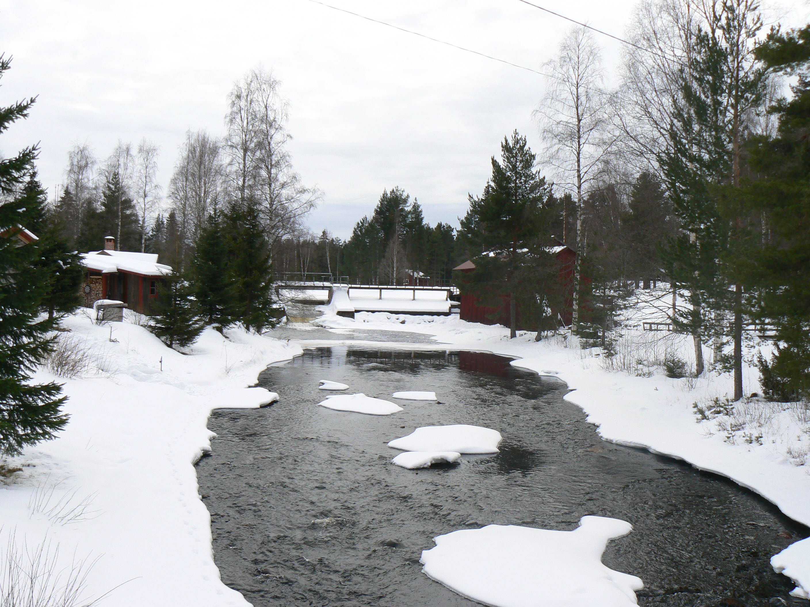 Mångån, "Mång river", at Mångberg, Sweden, in March 2007